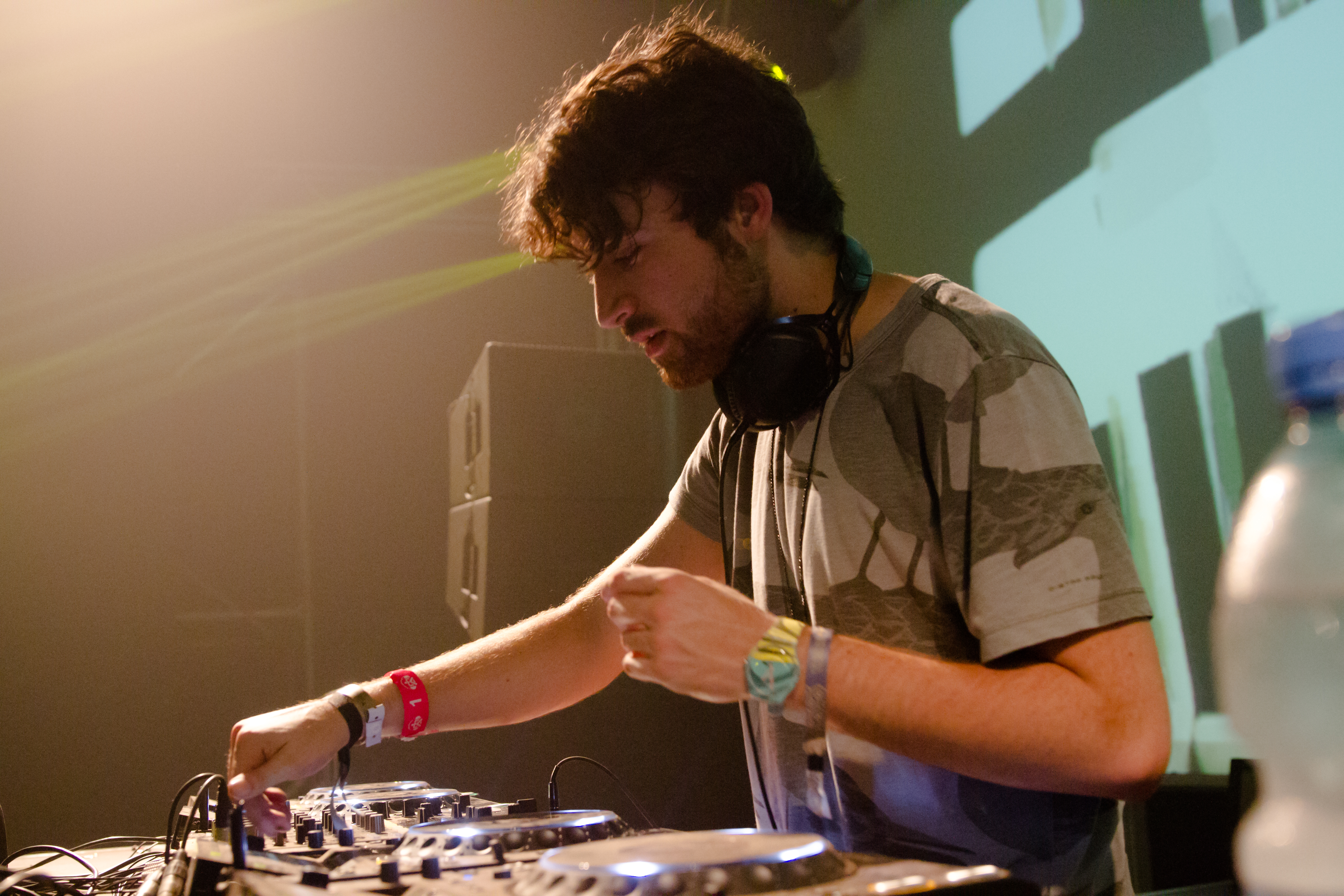 Oliver Heldens beim 14. Airbeat-One Dance Festivals das vom 16. bis 19. Juli 2015 auf dem Flugplatz Neustadt-Glewe stattfand.